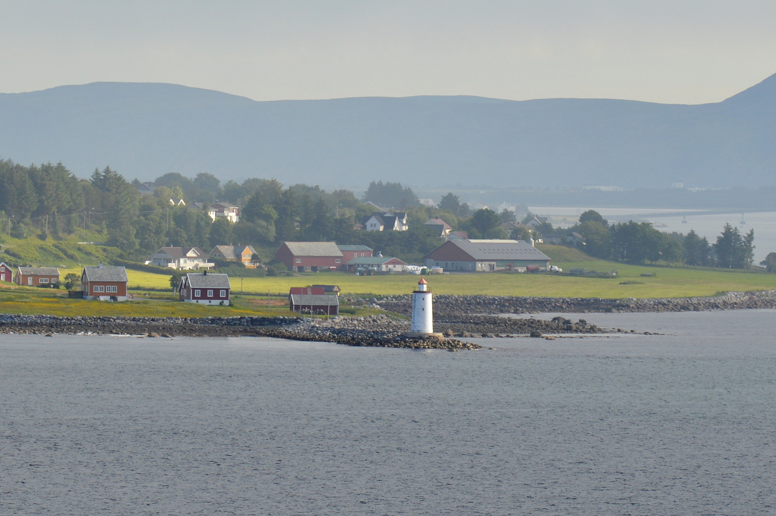 Hogsteinen fyr, Leuchtturm vor Alesund